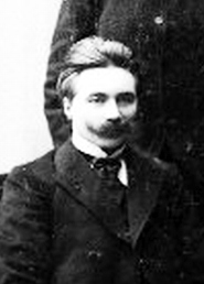 Arbeiderpartiets stortingsgruppe 1906 - 1909 Sittende fra venstre: Isak Saba